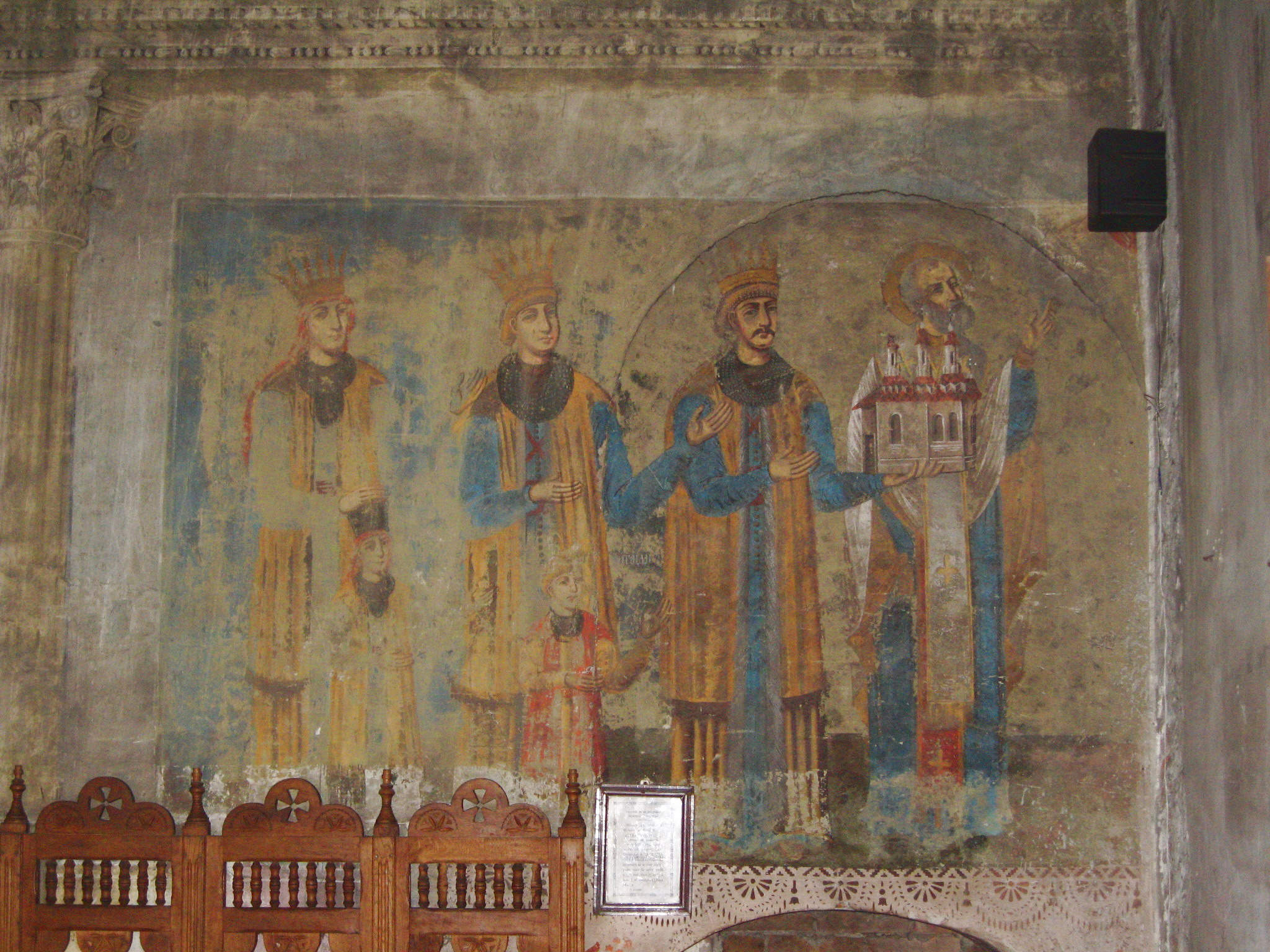 Mănăstirea Râşca